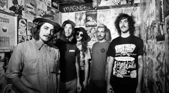 Los growlers durante la grabacion de Mama Said